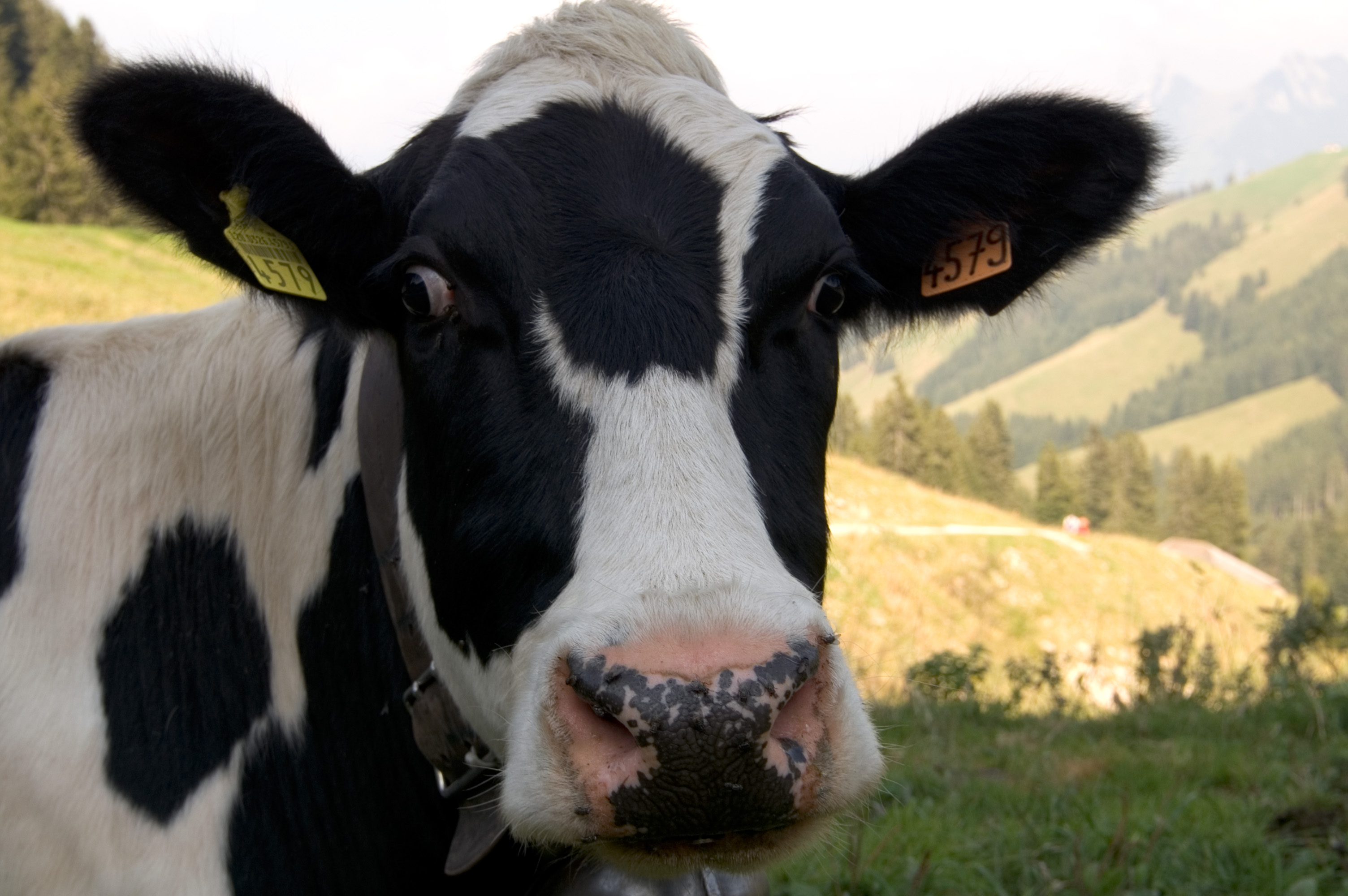 Oh la belle vache qui louche!